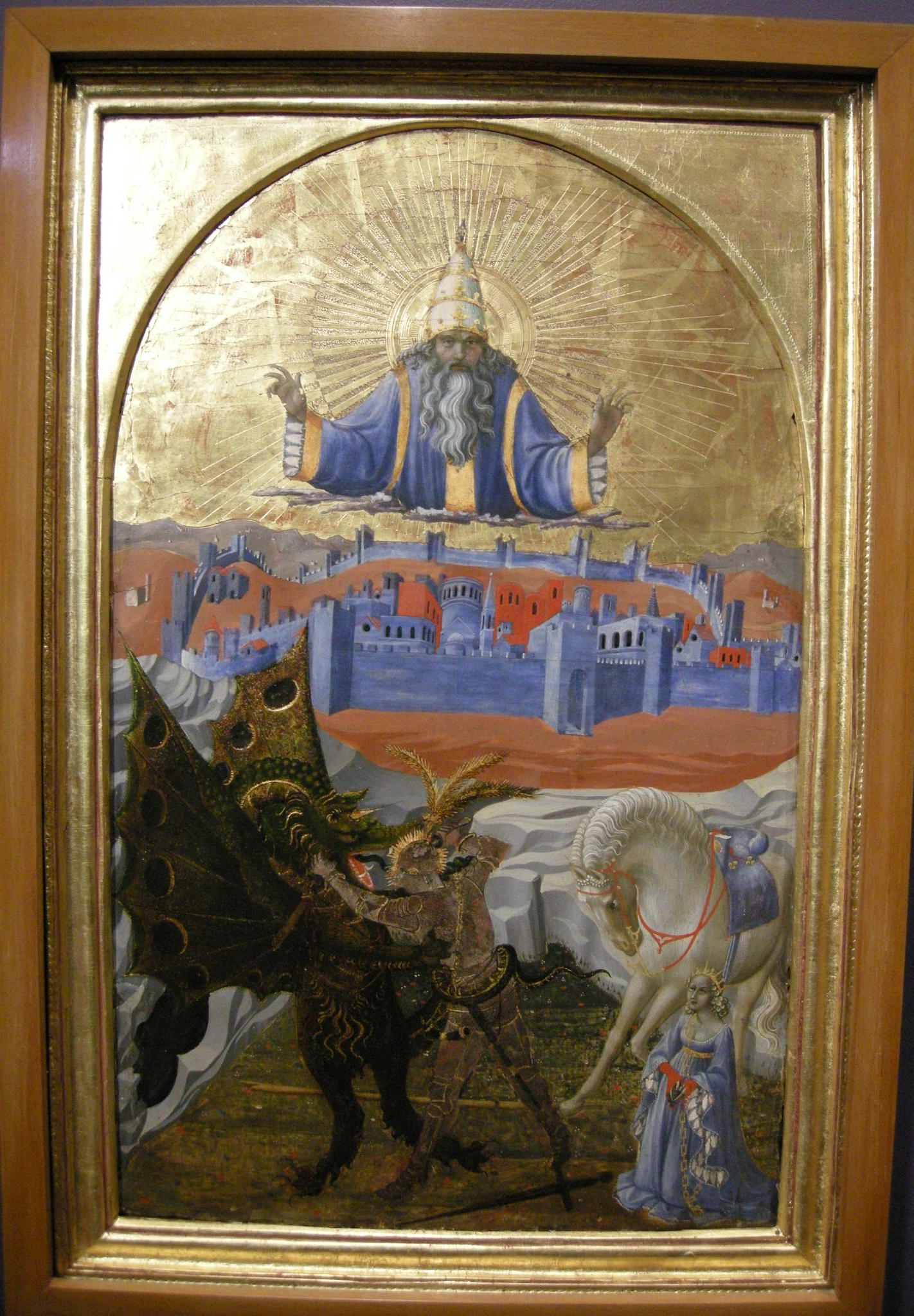 Paolo uccello, san giorgio e il drago, 1431 circa